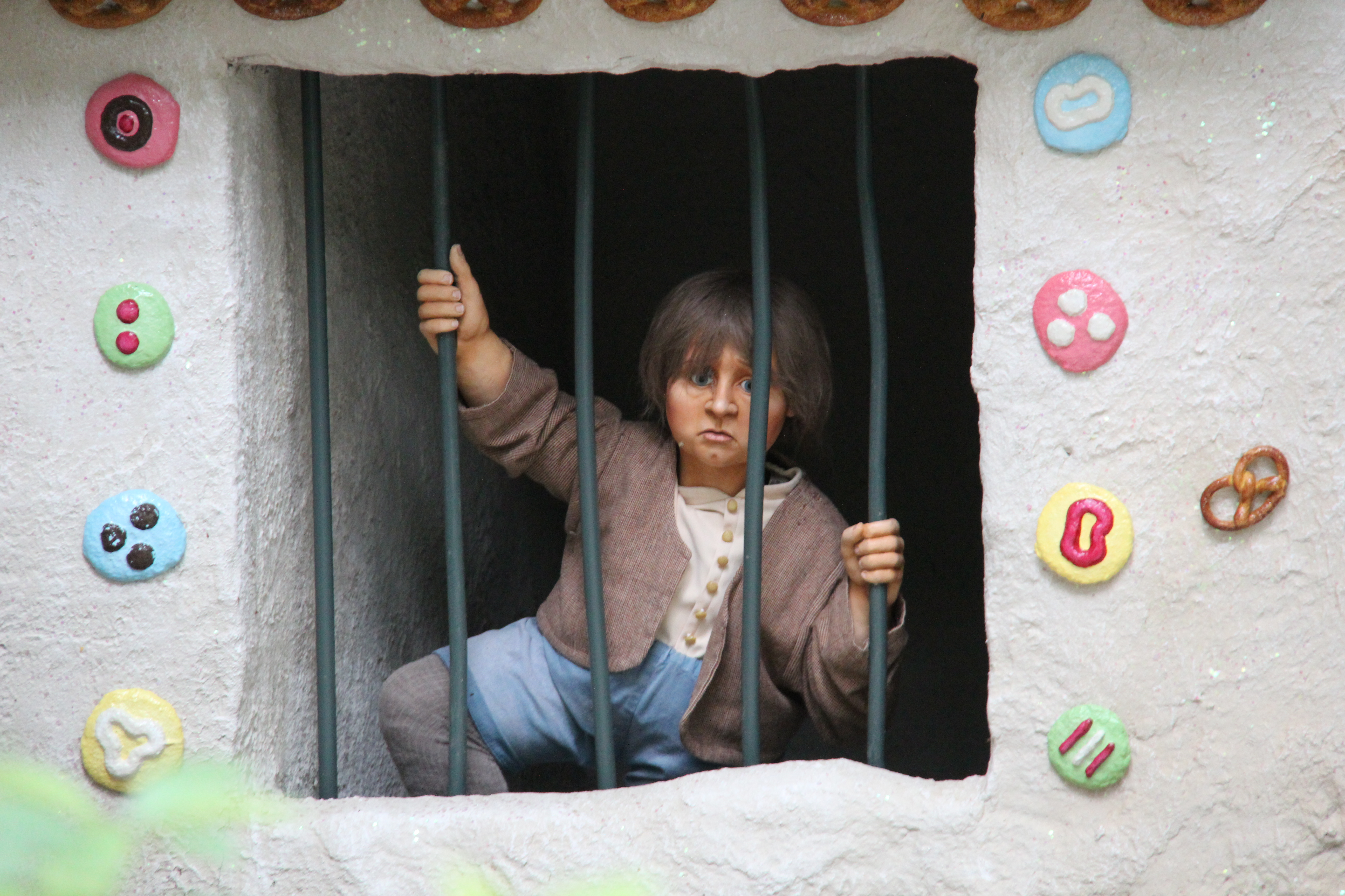 Hans uit het sprookje Hans en Grietje.